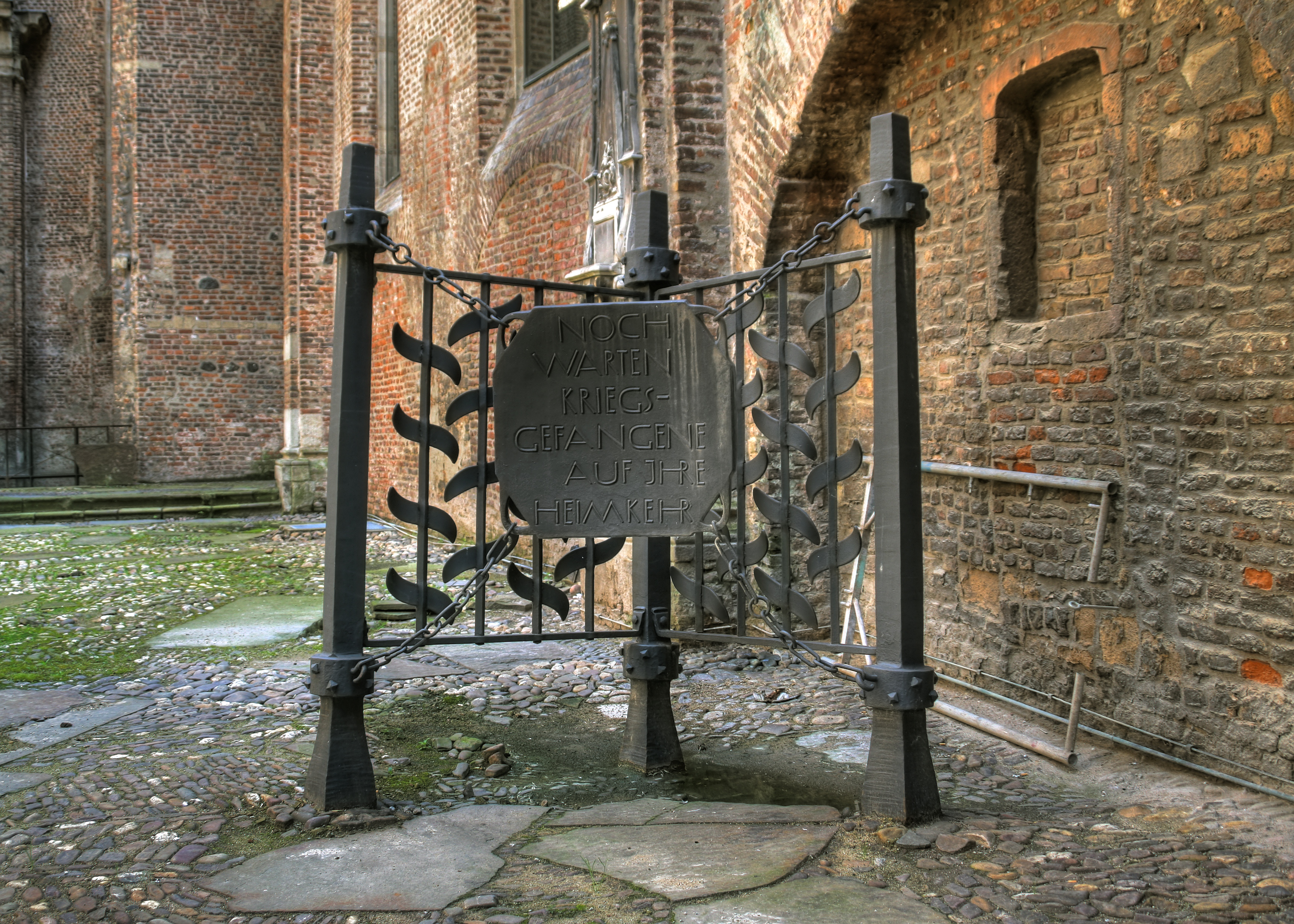 See below